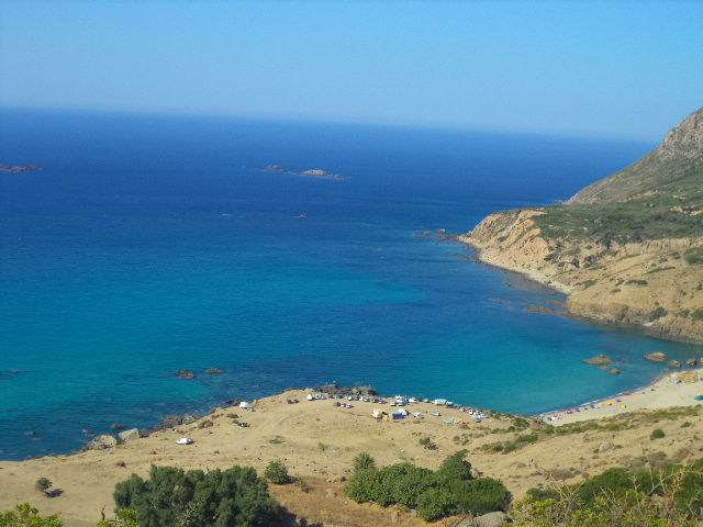 Cap de fer , entre wilaya de Skikda et wilaya de Annaba plage du cap de fer